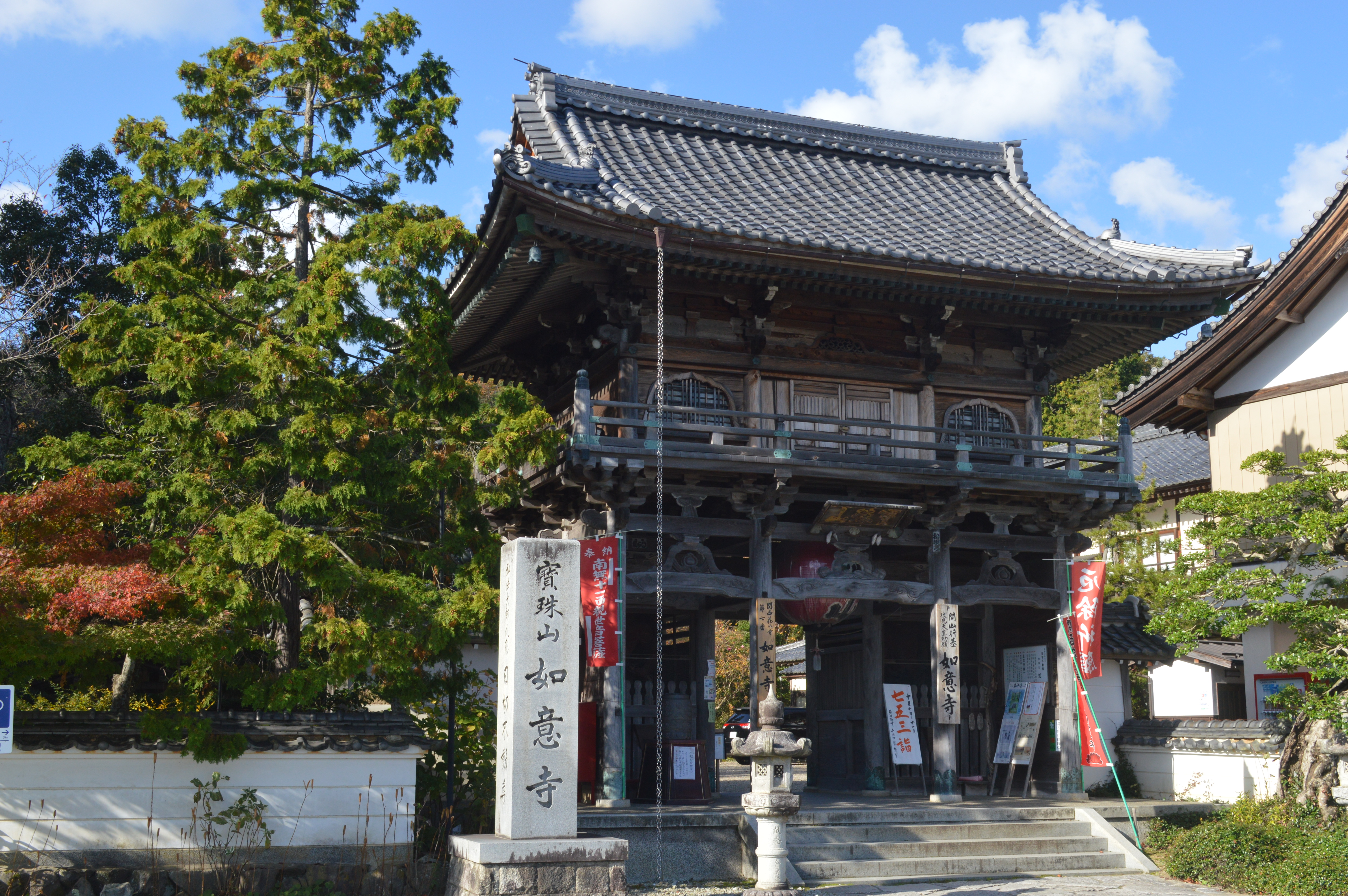 如意寺。京都府京丹後市久美浜町。